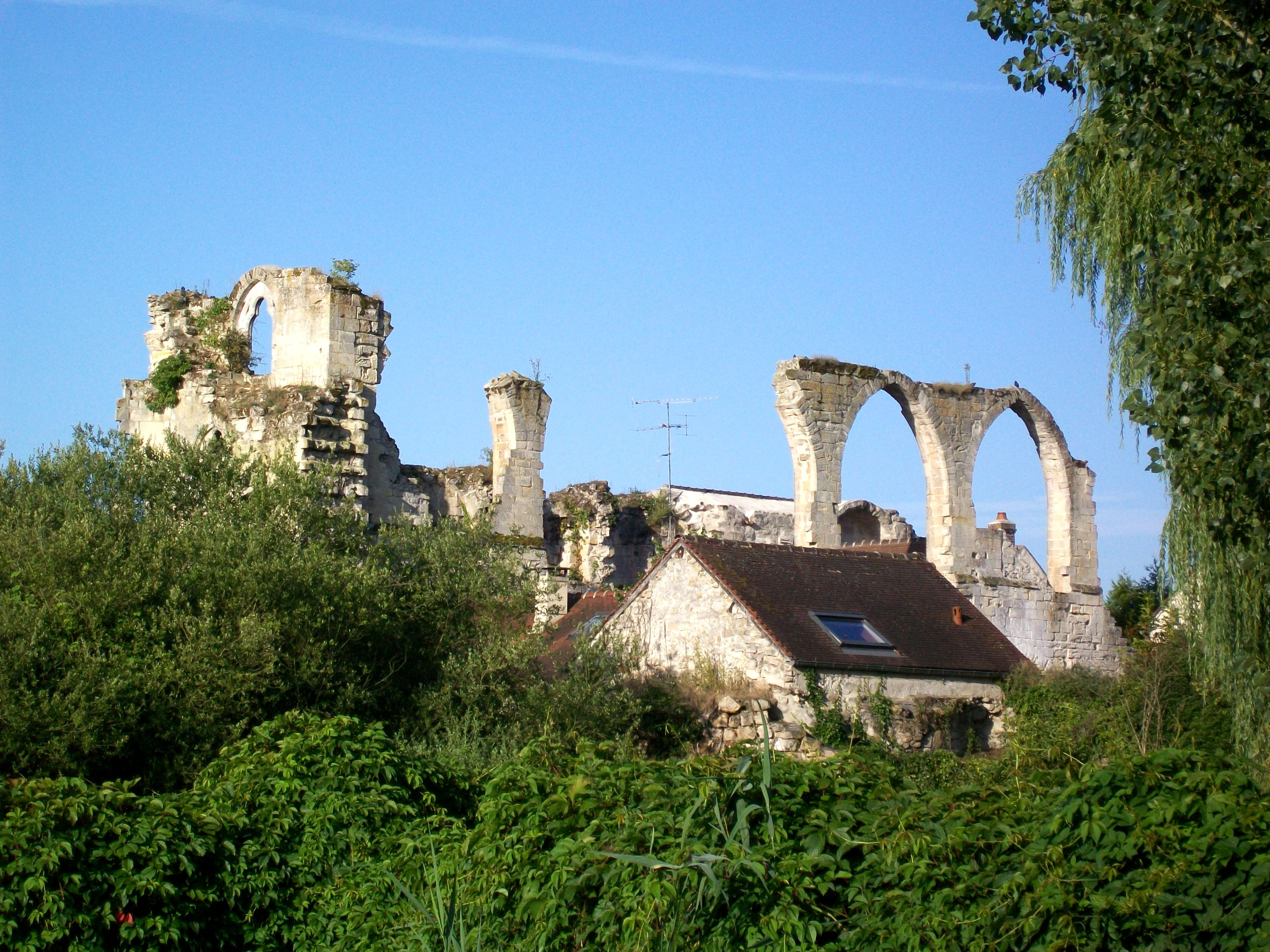 La chapelle de l'ancien château (à g.) et les arcades de la grande salle d'apparat (à dr.), vue depuis le nord-est (de ce côté, l'on ne peut pas s'approcher des ruines).